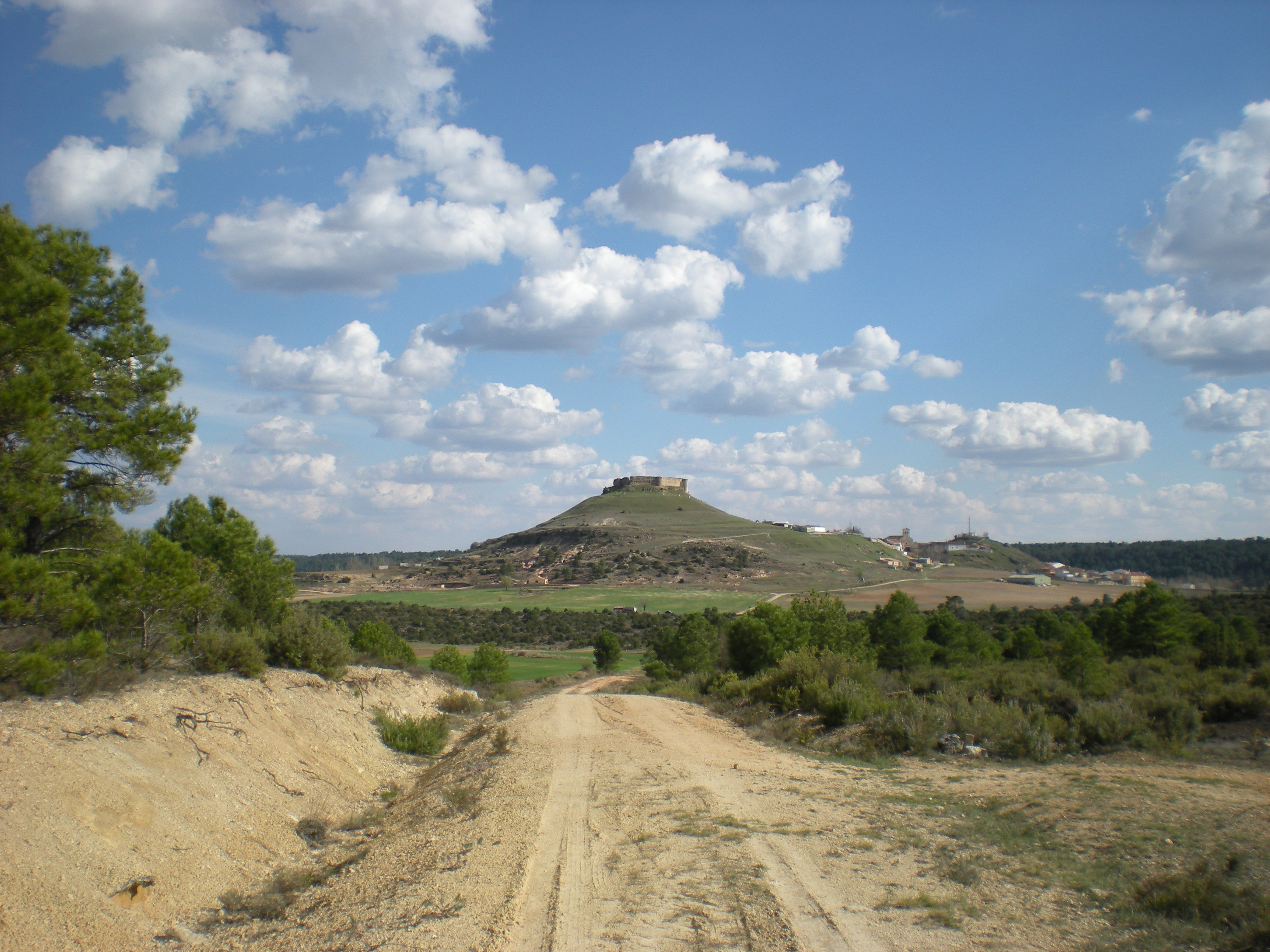 Zicht op de berg met het kasteel, Monteagudo de las Salinas.